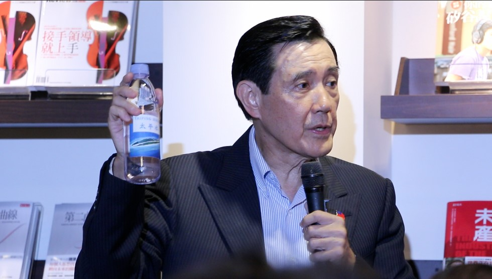 中文（台灣）: 台灣前總統馬英九展示來自太平島的淡水